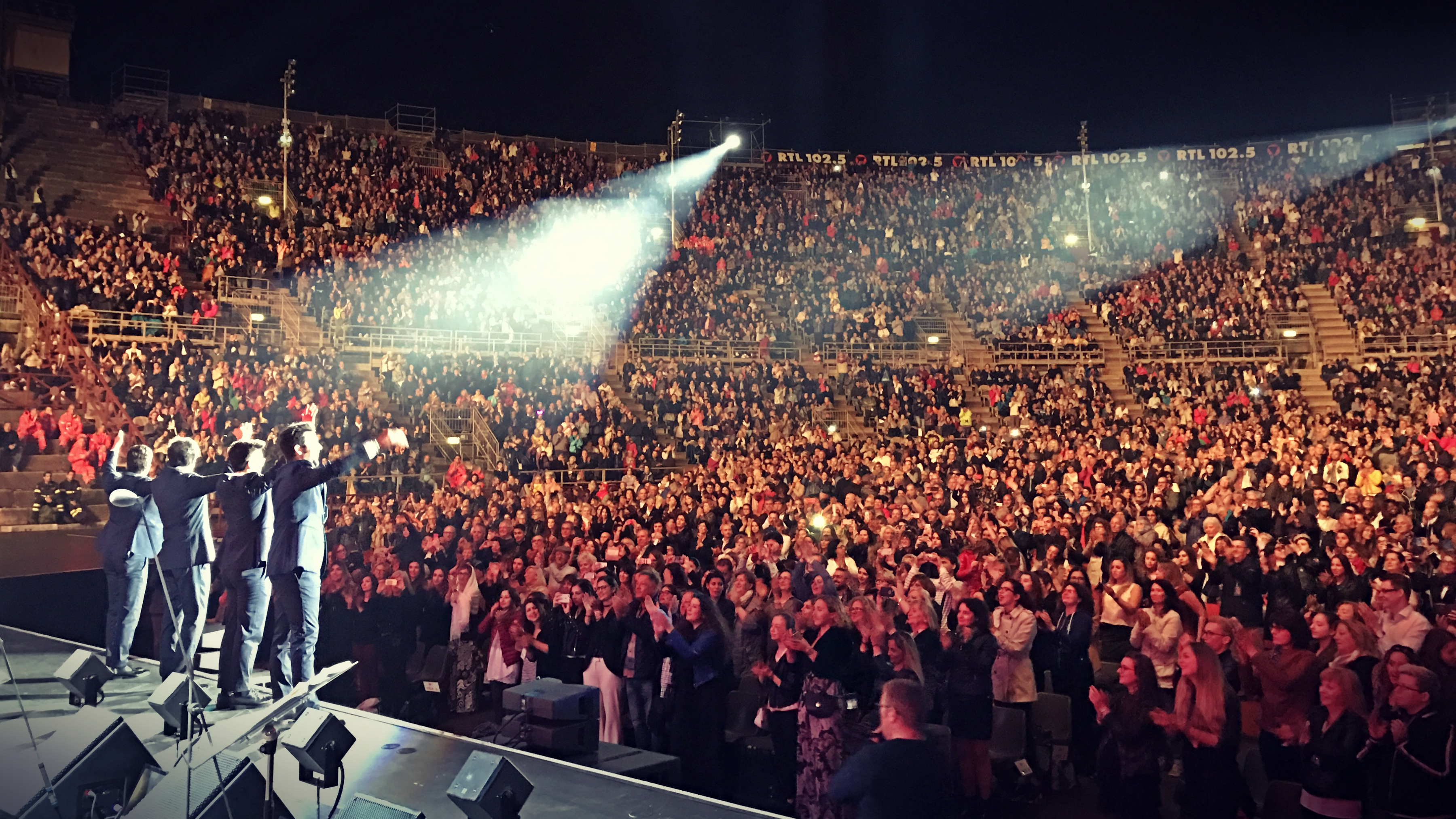 Il Volo sul palco dell'Arena di Verona il 19 maggio 2017, durante il Notte Magica Tour. Con il Maestro Marcello Rota.